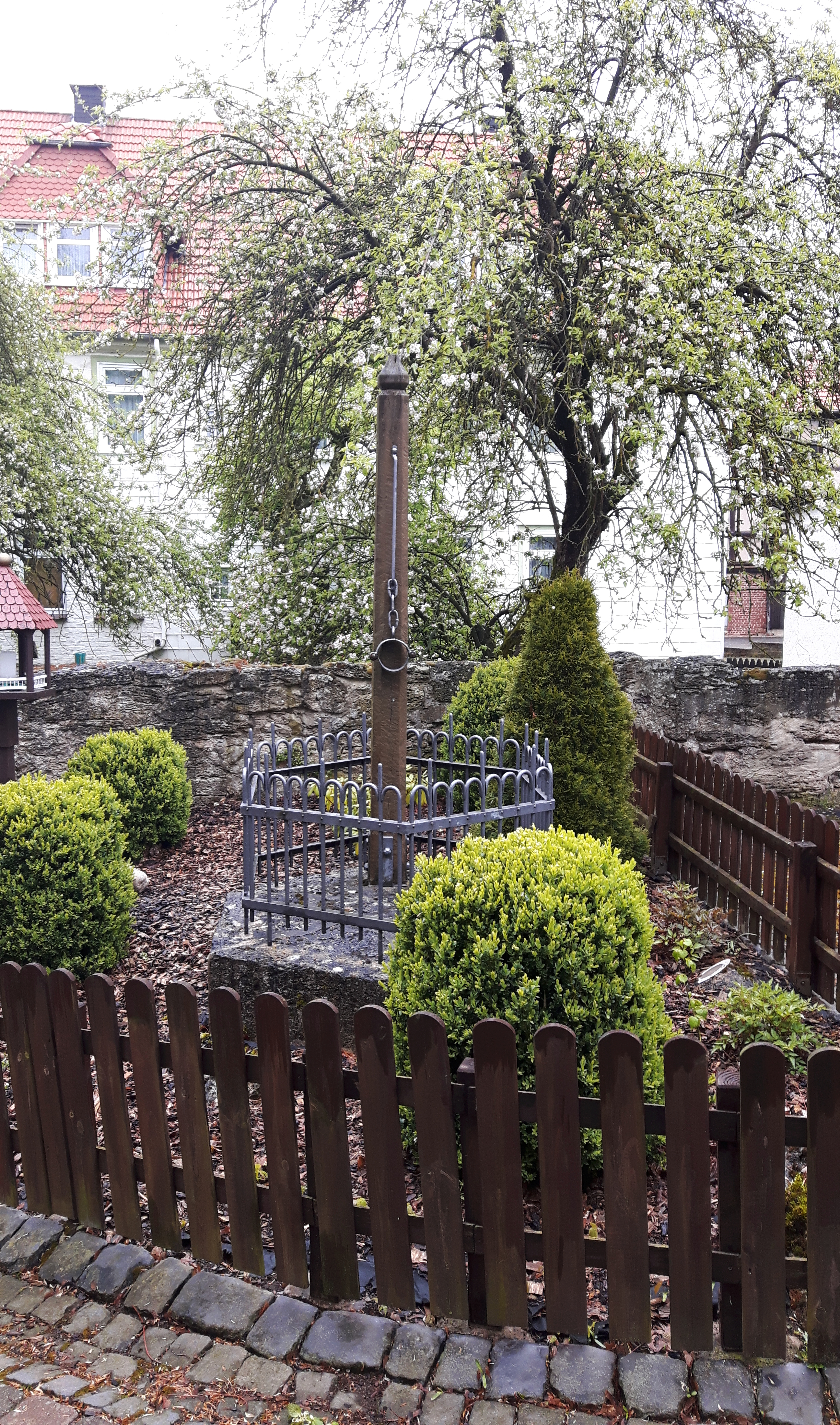 Schadpfahl in Adorf, Gemeinde Diemelsee